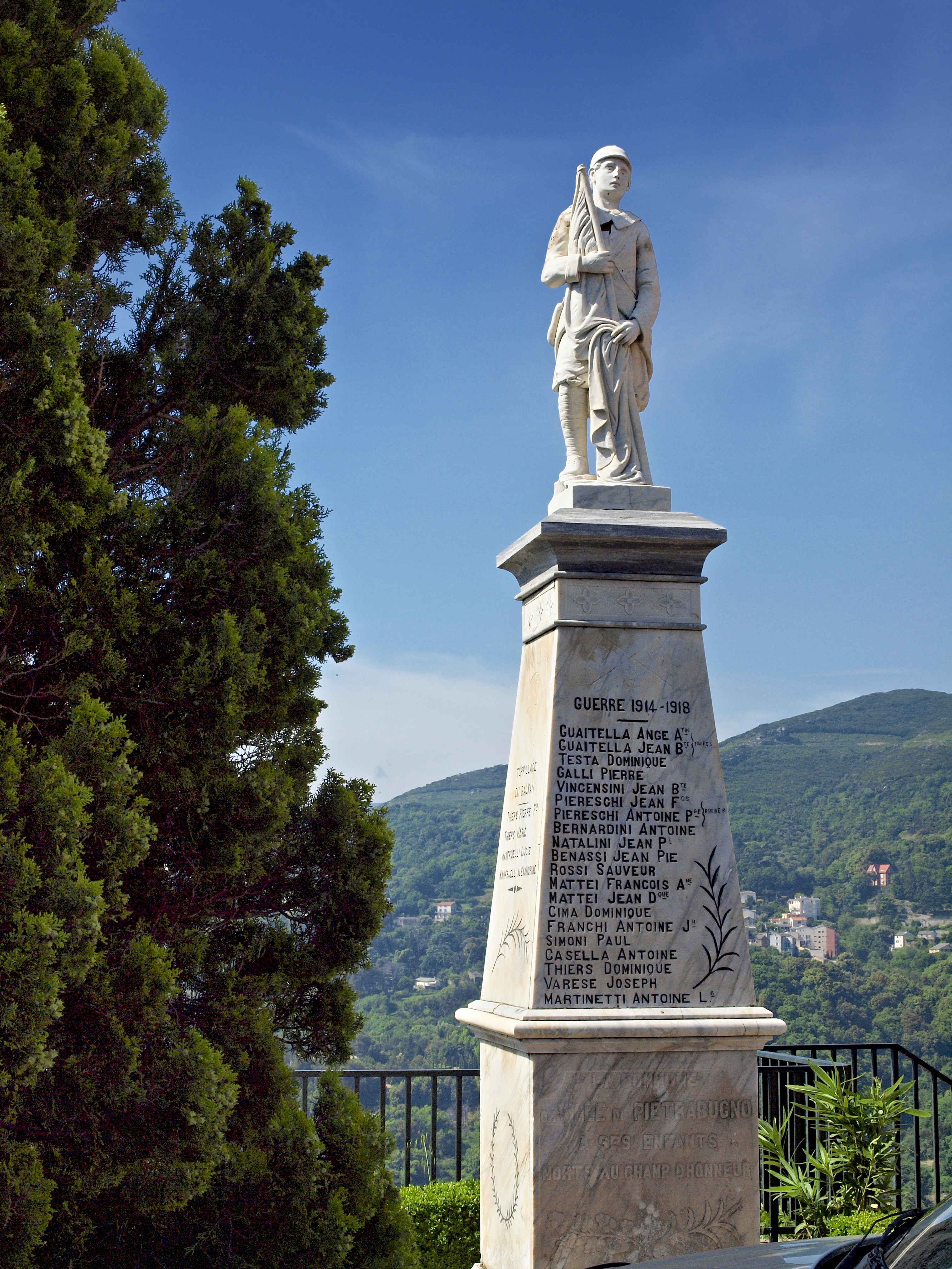 Ville-di-Pietrabugno (Corsica) - Monument aux morts, devant l'église Santa Lucia